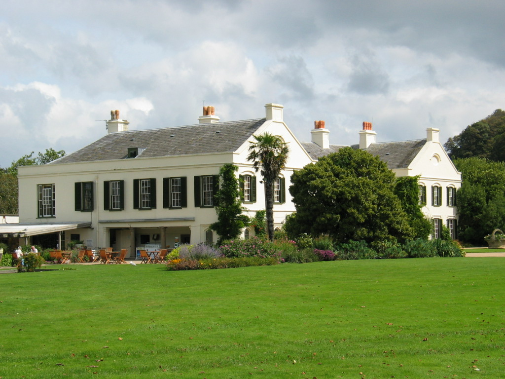 Het landhuis op landgoed Samarès Manor. De foto is gemaakt door H. de Vegt op 26 augustus 2004.